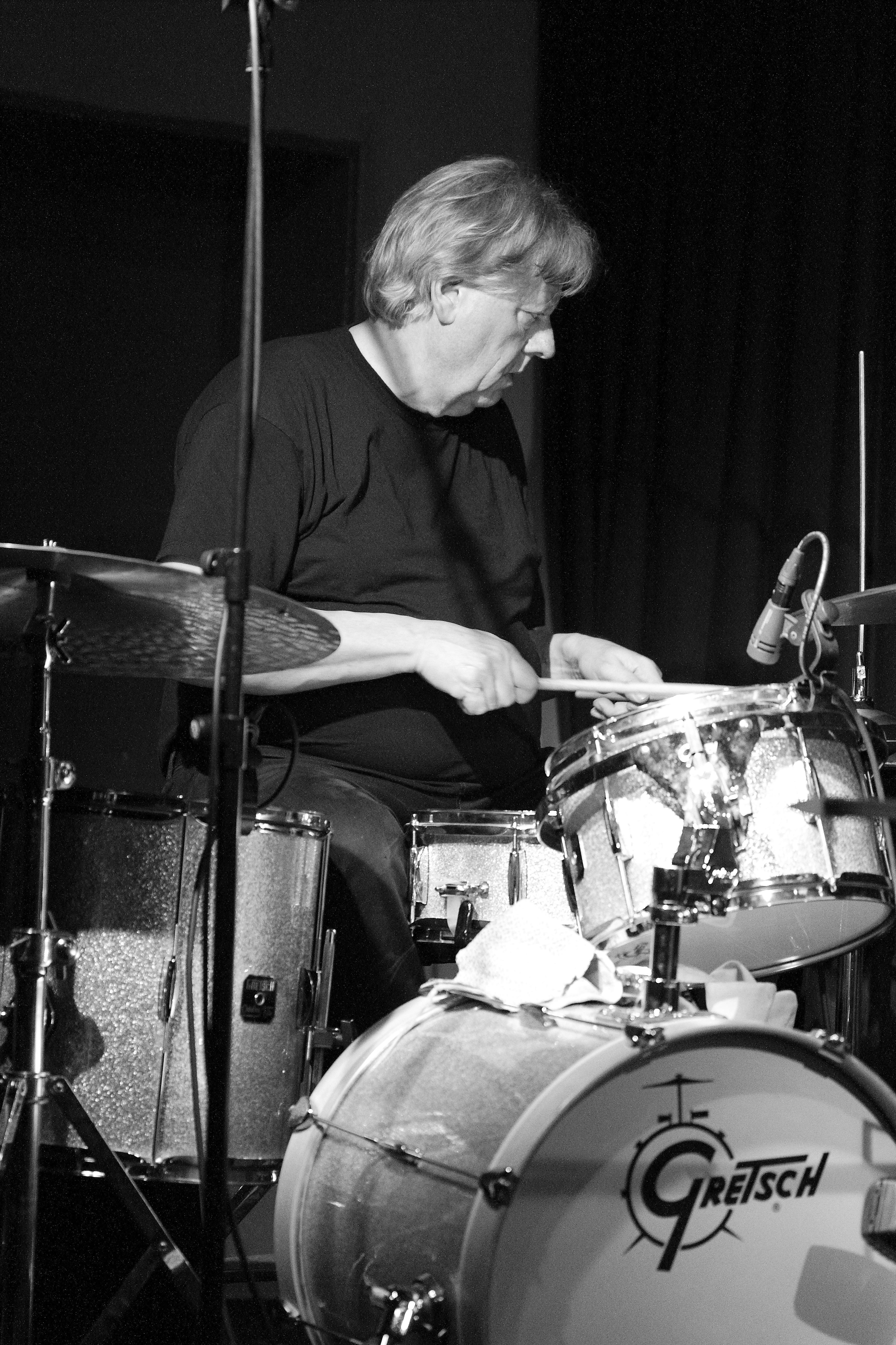 Das Trio mit John Butcher (sax), Wilbert de Joode (db) und Martin Blume (dr) im Club W71, 2018. Eine Veranstaltung in Zusammenarbeit des Club W71 mit dem SWR2 und Julia Neupert.